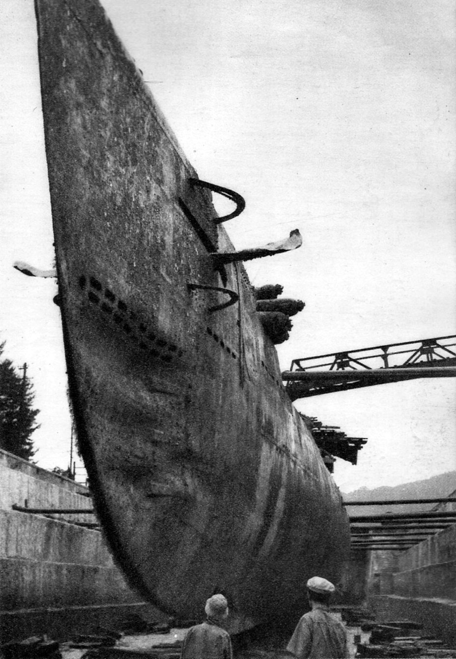 9年ぶりに引き揚げられ、排水が終わった伊号第33潜水艦(Submarine I-33)の全容。魚雷発射口も見えている。